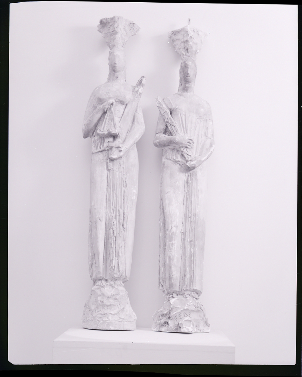 Arturo Martini, Terrecotte, s.d. Galleria Il Milione. Servizio fotografico : Milano, 1963 / Paolo Monti. - Buste: 26, Fototipi: 26 : Negativo b/n, gelatina bromuro d'argento/ pellicola ; 10x12. - ((Serie costituita da 26 buste sciolte di negativi identificati con una doppia numerazione (da 42652 a 42677): 24090, 24091, 24092, 24093, 24094, 24095, 24096, 24097, 24098, 24099, 24100, 24101, 24102, 24103, 24104, 24105, 24106, 24107, 24108, 24109, 24110, 24111, 24112, 24113, 24114, 24115. - La doppia numerazione potrebbe corrispondere ai lavori realizzati durante il periodo di attività del laboratorio e studio fotografico "Foto Studio 22", società che risulta essere stata aperta il 10/04/1961, con partecipazione, nel ruolo di gerente, di Vincenzo Carrese. - Nella rubrica citata nel campo Fonti in corrispondenza degli estremi numerici identificativi della serie iscrizione didascalica manoscritta: "Arturo Martini: terrecotte Galleria 'Milione' ". . - Fonte: Rubrica di Paolo Monti: Archivio fino 1-4-1961/ 31-3-1963 (1961-1963), presso Archivio Paolo Monti